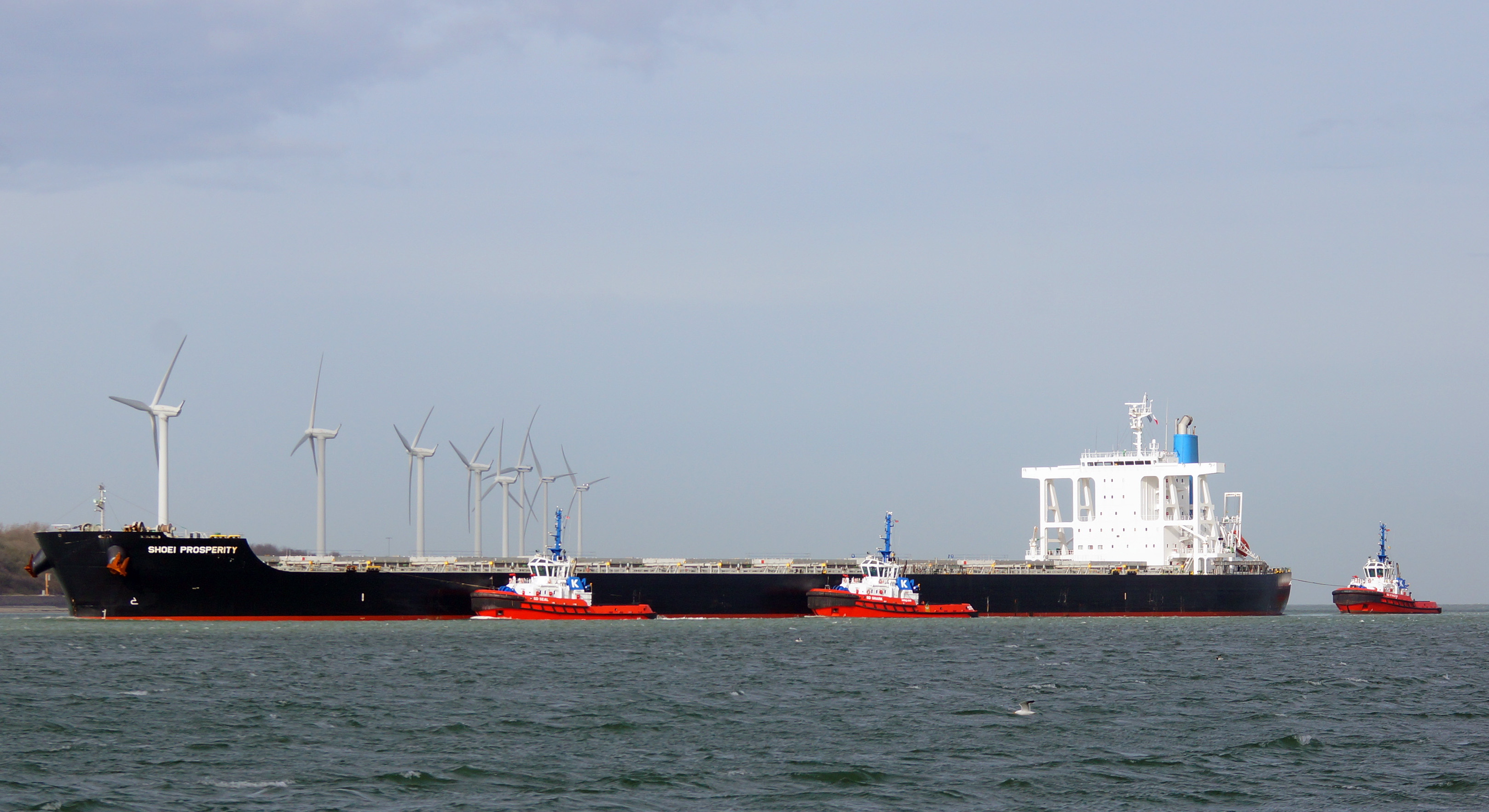 Calandkanaal 19-3-2014